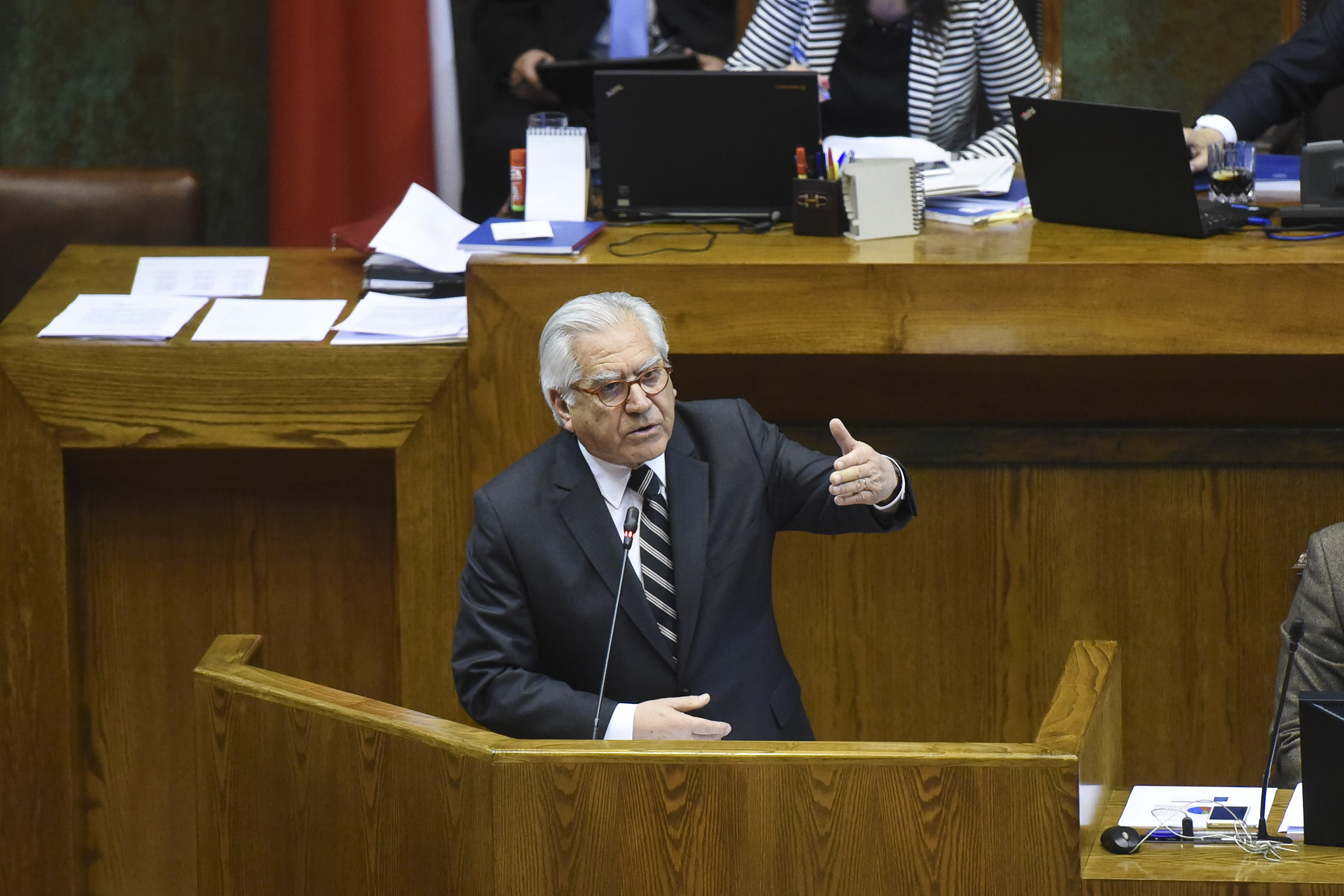 05 septiembre 2017, Ministra Paula Narváez asiste a interpelación a Ministro Mario Fernandez en congreso nacional.